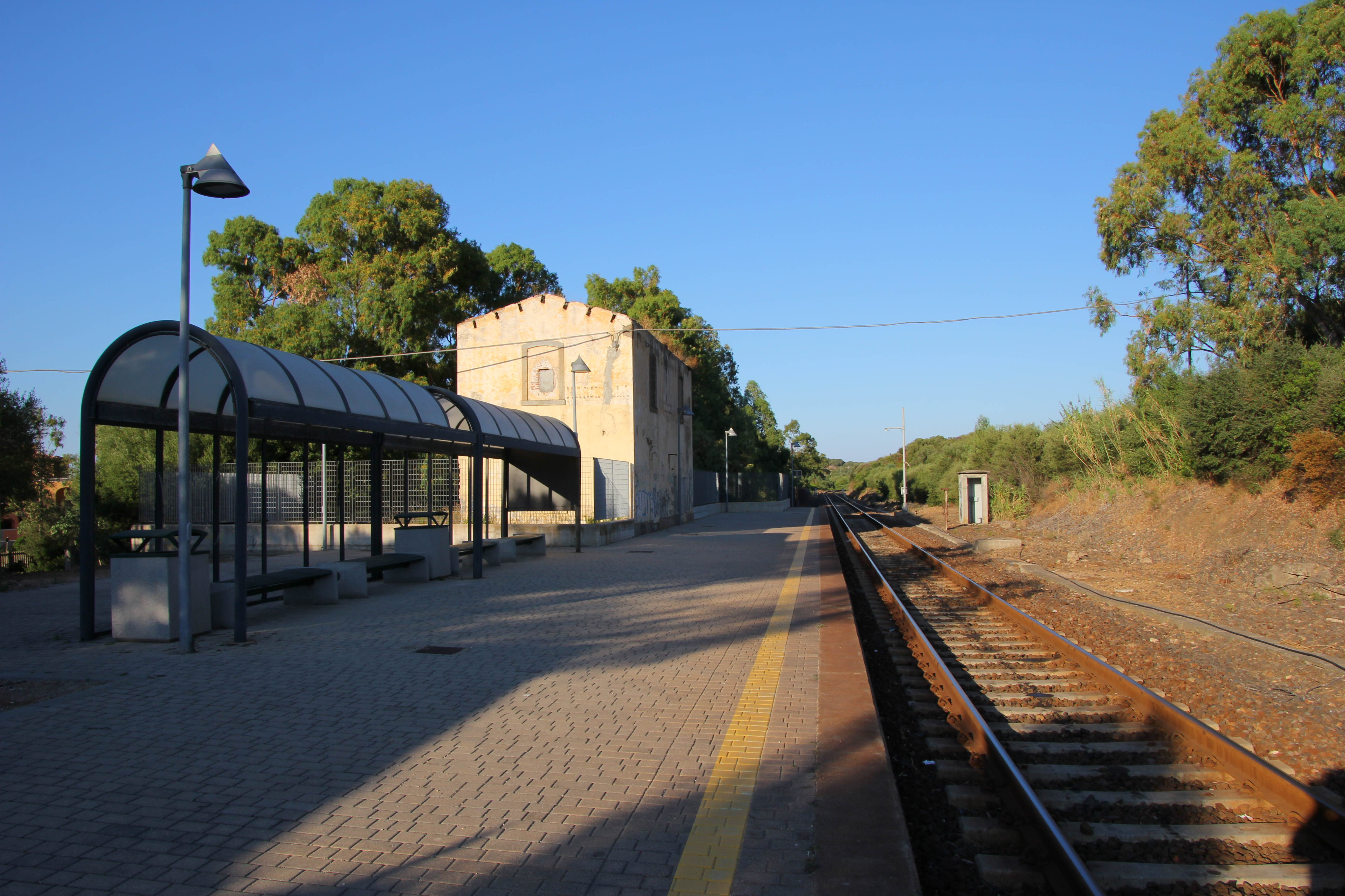 Golfo Aranci - Stazione di Marinella